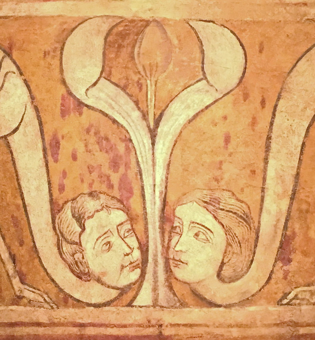 Detall dels caps